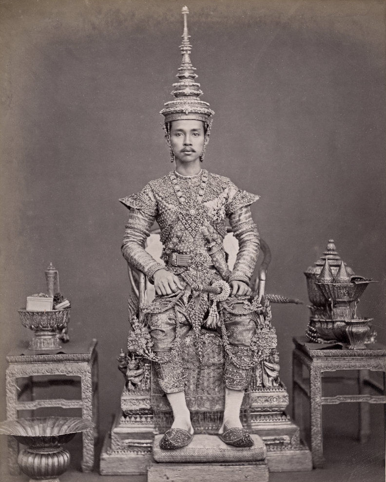 Rama V